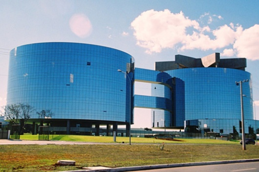 Office of the "Ministério Público do Brasil" in Brasília Sede do Ministério Público do Brasil em Brasília picture made by Bruno Lessa - brunoslessa(at)topotesia(dot)net